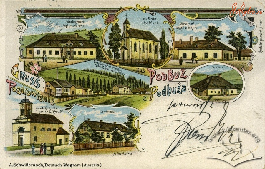 Подбуж. Архивное фото.